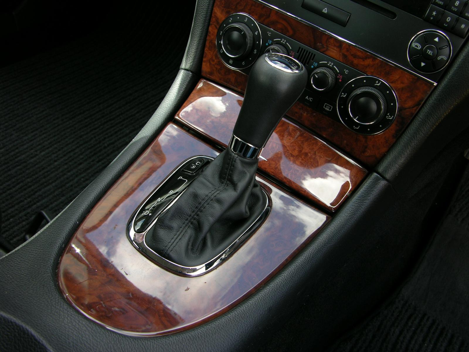 Mercedes Benz CLK 200 Kompressor